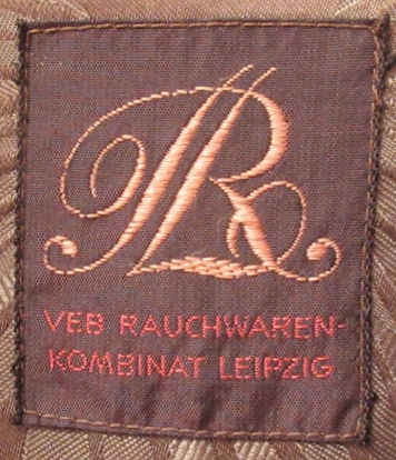 VEB Rauchwaren-Kombinat Leipzig (Webetikett).